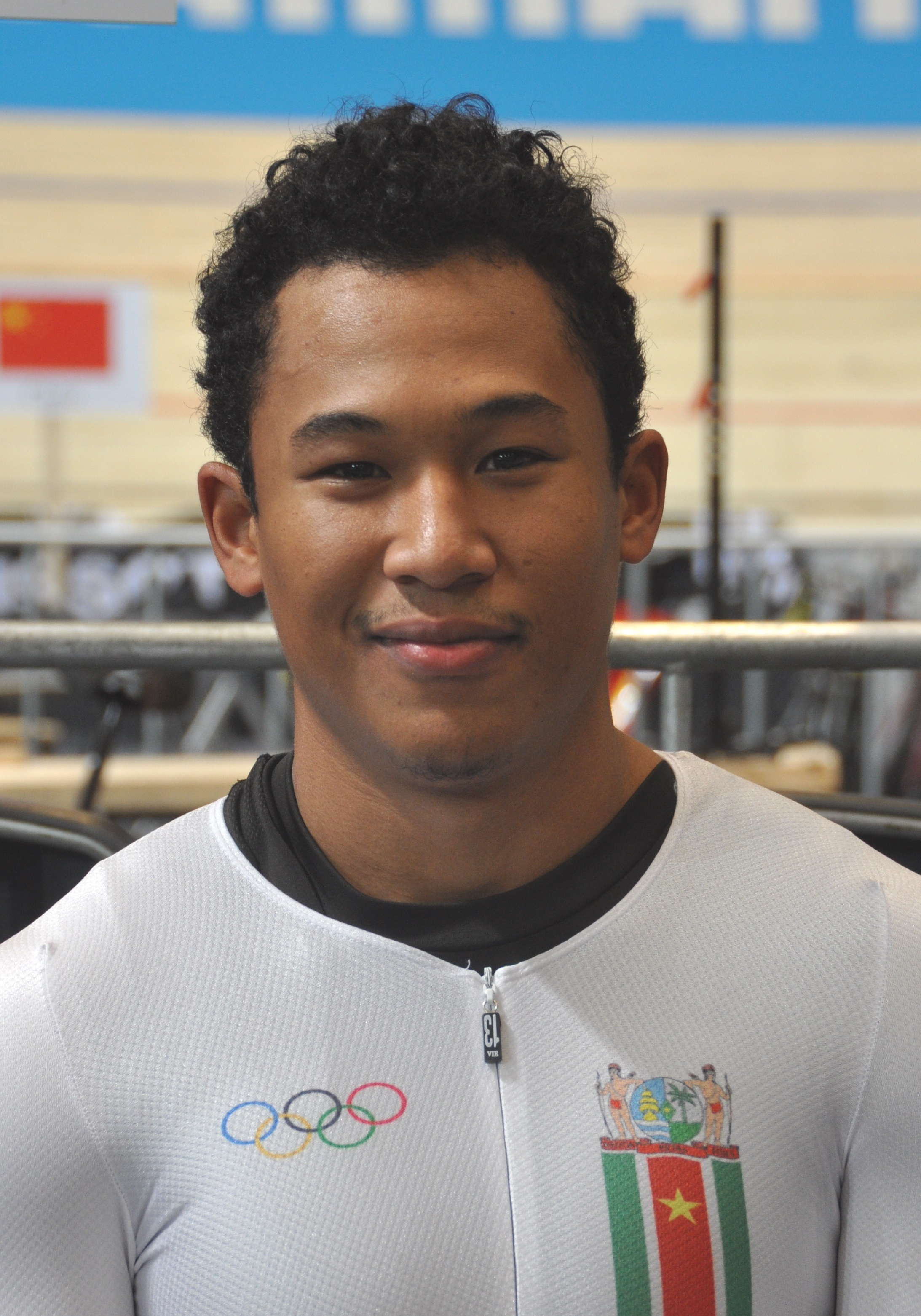 Jair Tjon En Fa, Radsportler aus Surinam